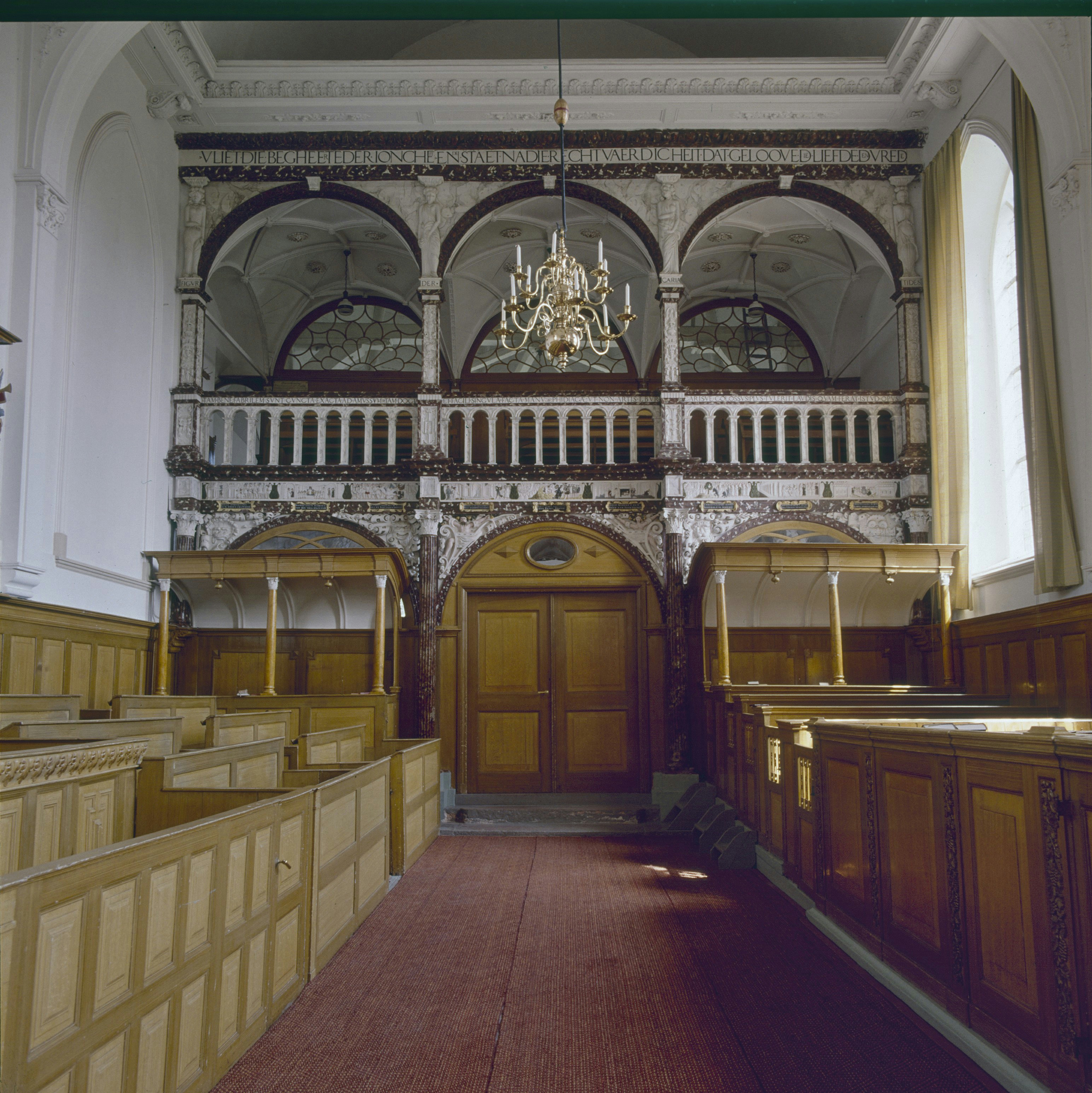 Martinuskerk: Interieur, overzicht van de oostgevel met het beschilderde oksaal